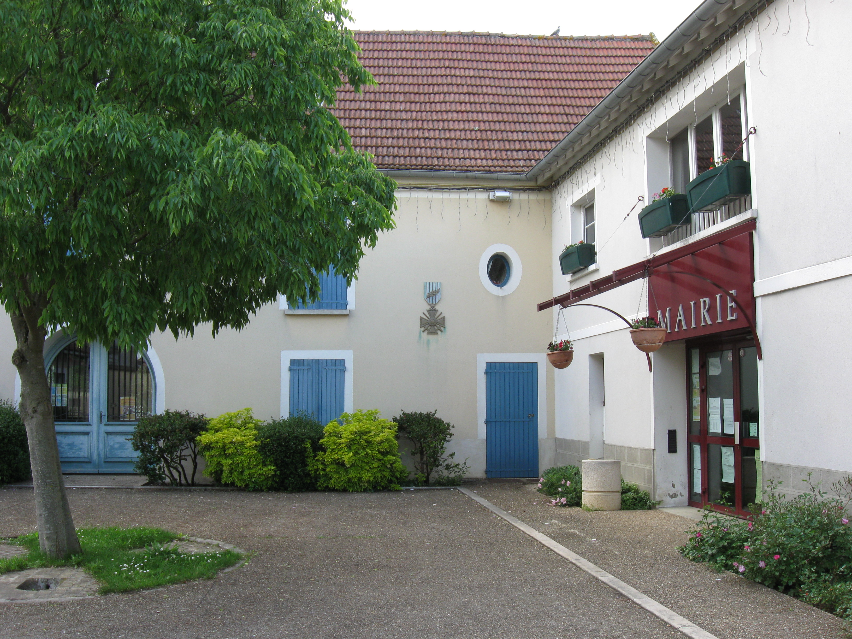 Mairie de Mary-sur-Marne. (département de la Seine et Marne, région Île-de-France).